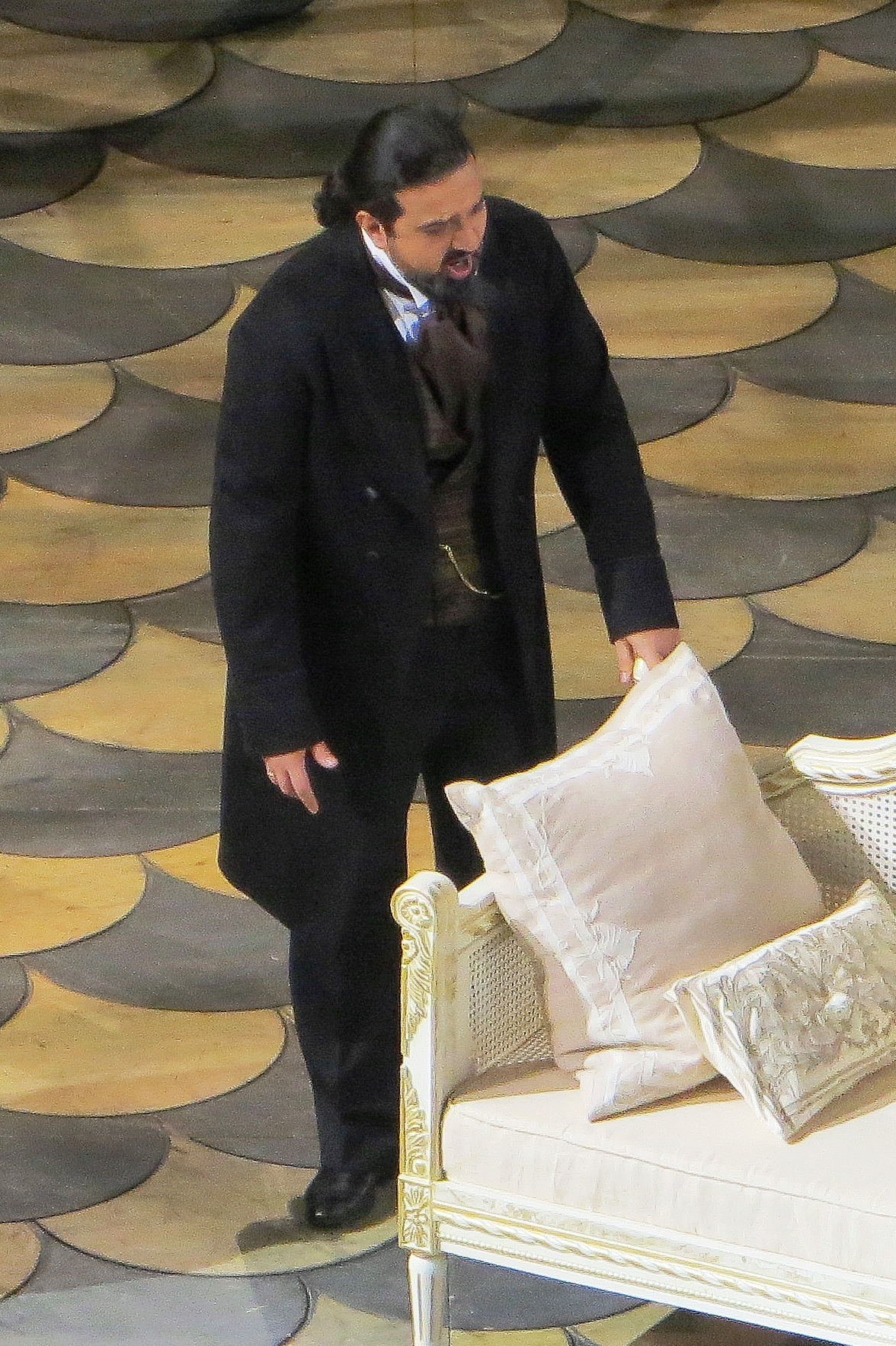 Elchin Azizov as Georgr Germon (La traviata). Bolshoy Theatre, 2013